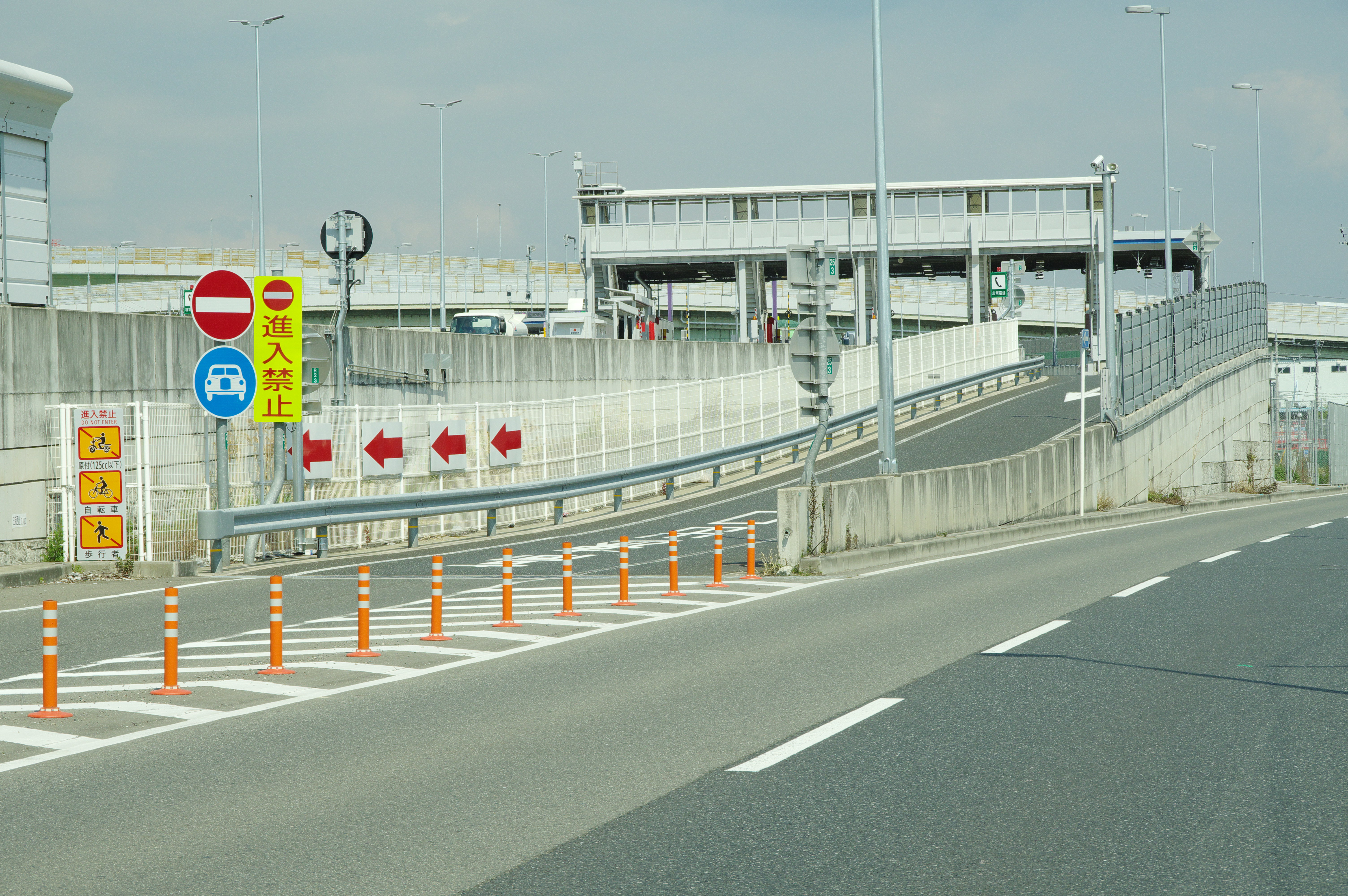 阪神高速6号大和川線 三宅西出口 大阪府道179号線 大阪府松原市三宅西